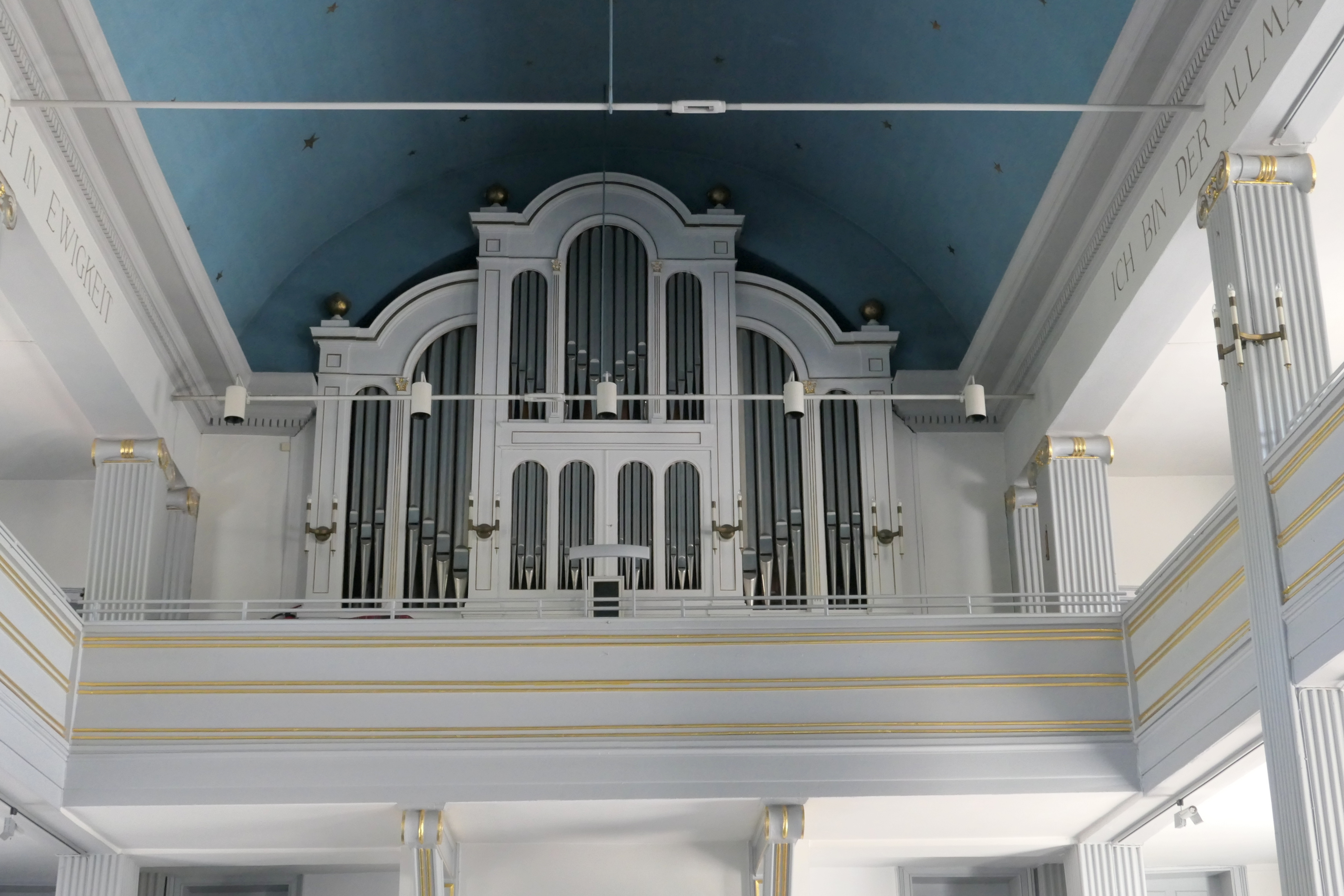 Orgel der Martinskirche Ritzebüttel, Landkreis Cuxhaven, Niedersachsen, Deutschland